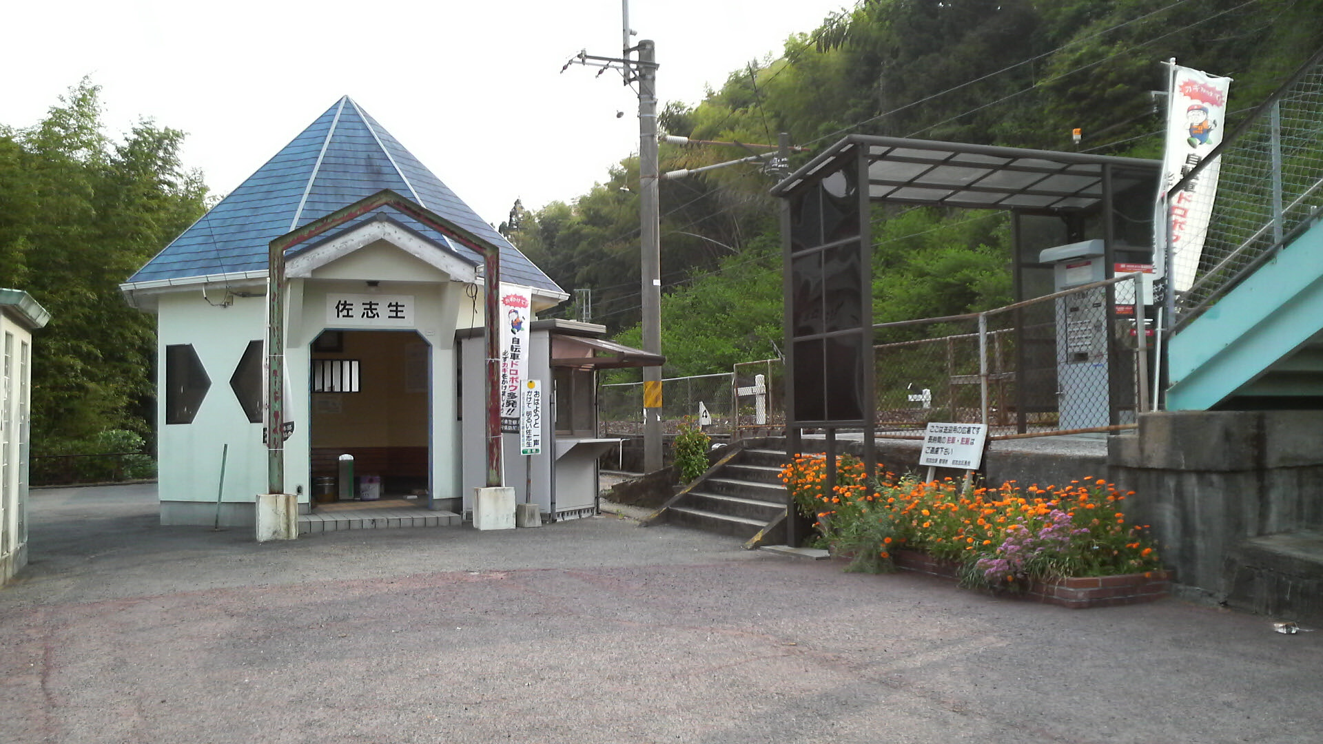 佐志生駅外観。向って左から、トイレ、待合室、窓口、切符券売機、歩道橋。写真右が大分方面。投稿者が2008/5/18に撮影。